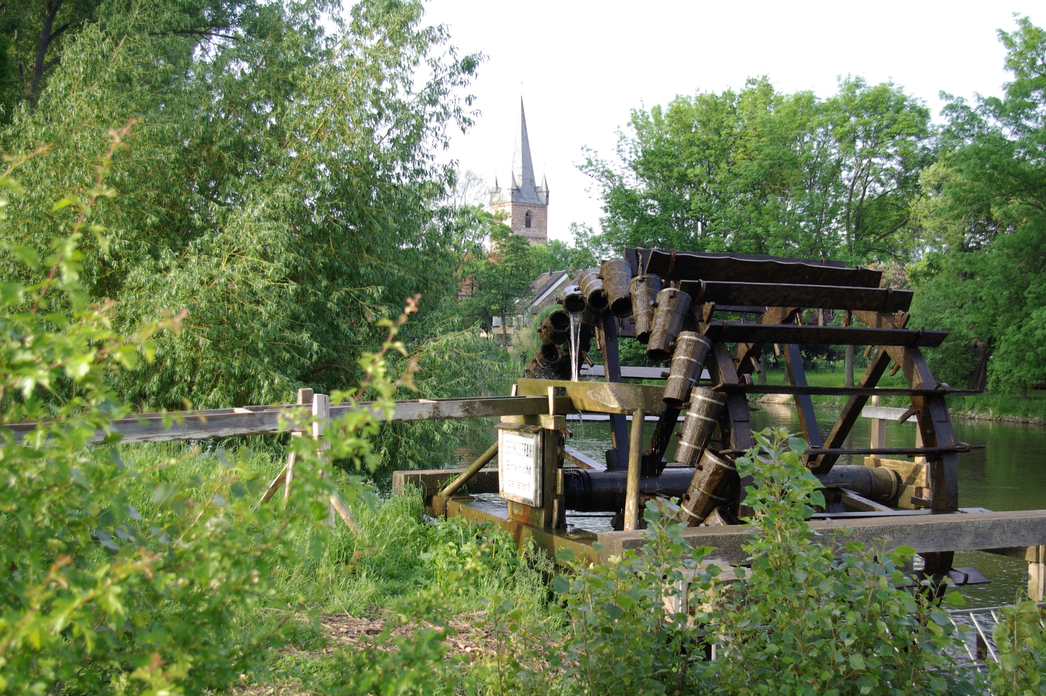 Wasserschöpfrad im Erlanger Stadtteil Bruck